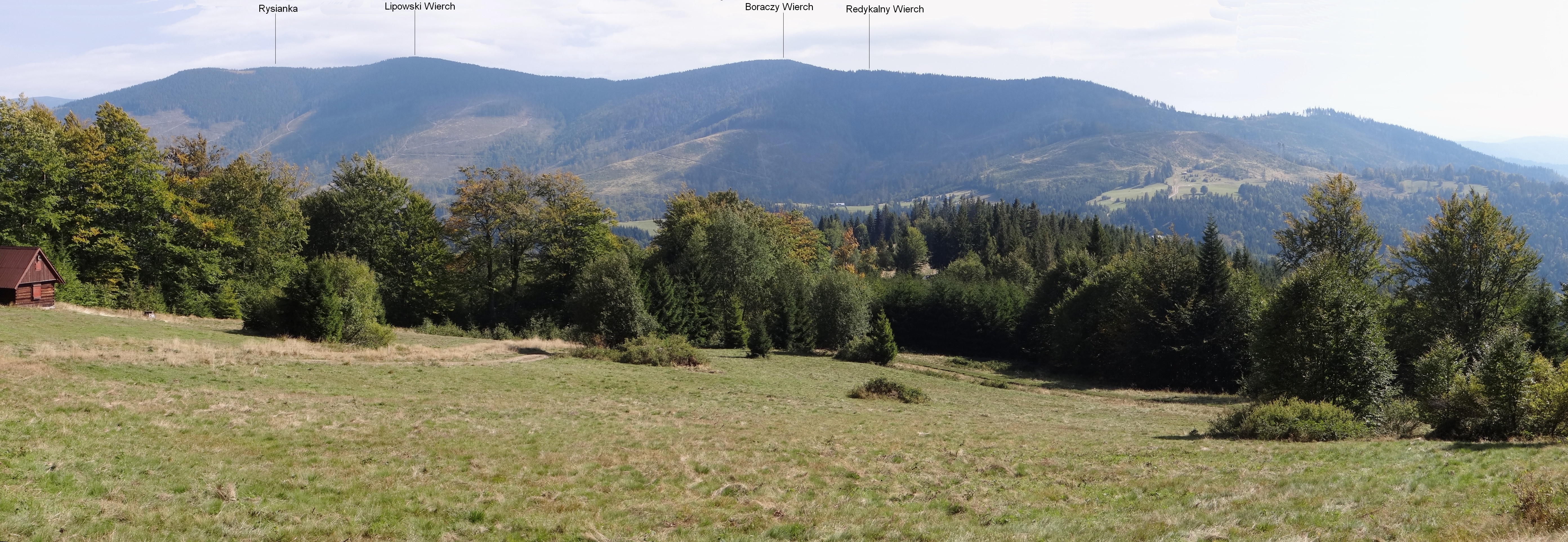 Widok z Prusowa na grupę Lipowskiego Wierchu